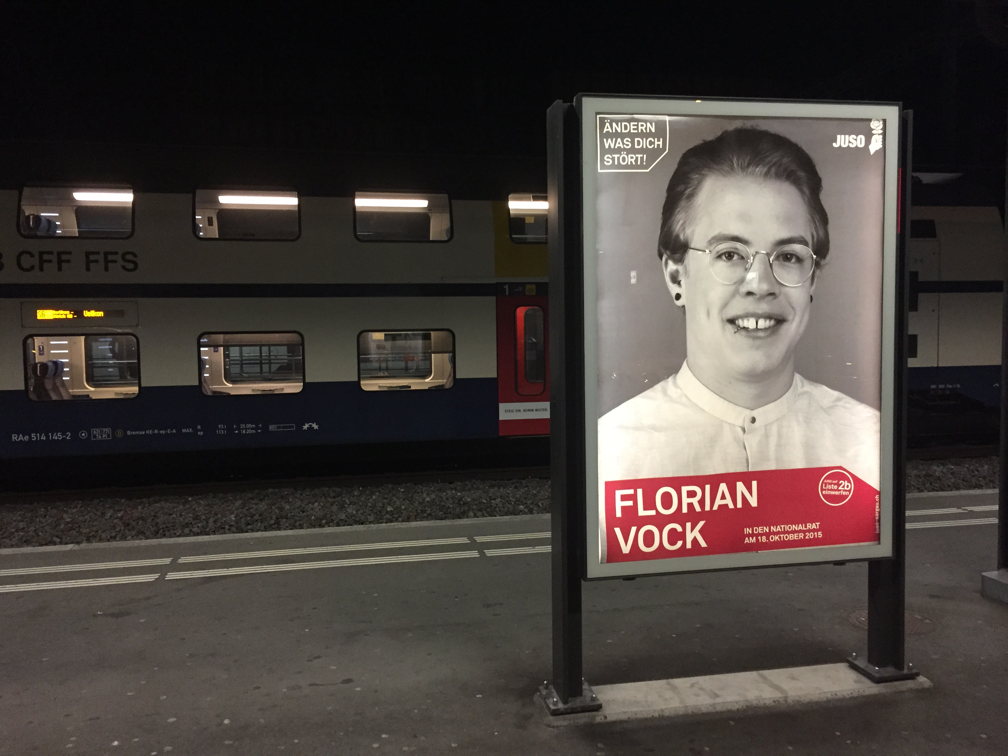 Wahlplakat von Florian Vock für die Nationalratswahl am 18. Oktober 2015 am Bahnhof in Baden